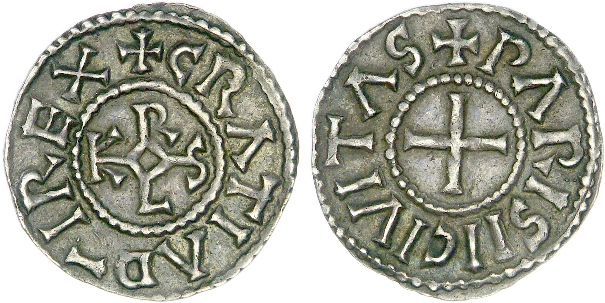 Nom de l'atelier : Paris Métal : argent Diamètre : 20,5mm Axe des coins : 6h. Poids : 1,77g. Titulature avers : + CRATIA D-I REX, (légende commençant à 12 heures). Description avers : Monogramme carolin dégénéré (KAROLVS). Traduction avers : (Charles, par la grâce de Dieu). Titulature revers : + PARISII CIVITAS. Description revers : Croix. Traduction revers : (Cité de Paris).